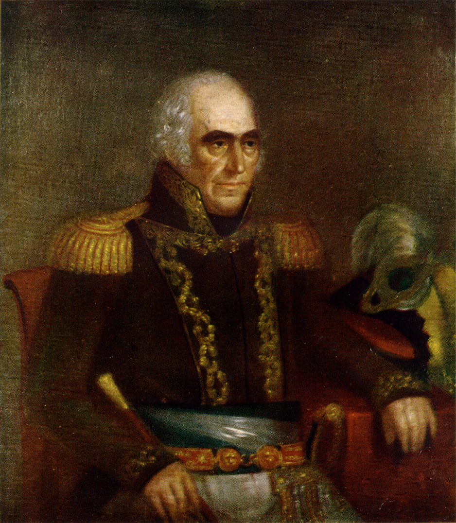 Imagen de Miguel Azcuénaga